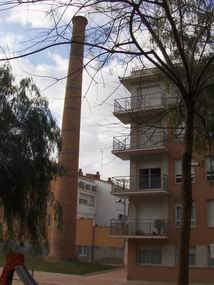 Xemeneia de Garriga Germans, situada a la Plaça de Beatriu de Dia (Sabadell, Vallès Occidental).